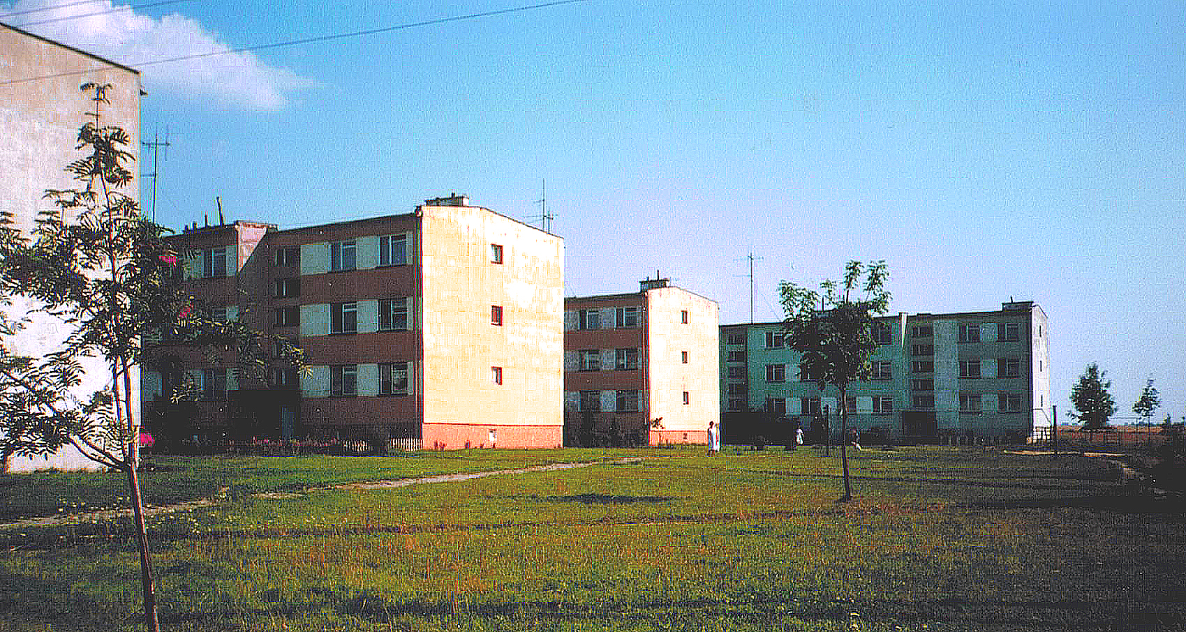 Tarnogród, Poland House blocks, bloki mieszkalne